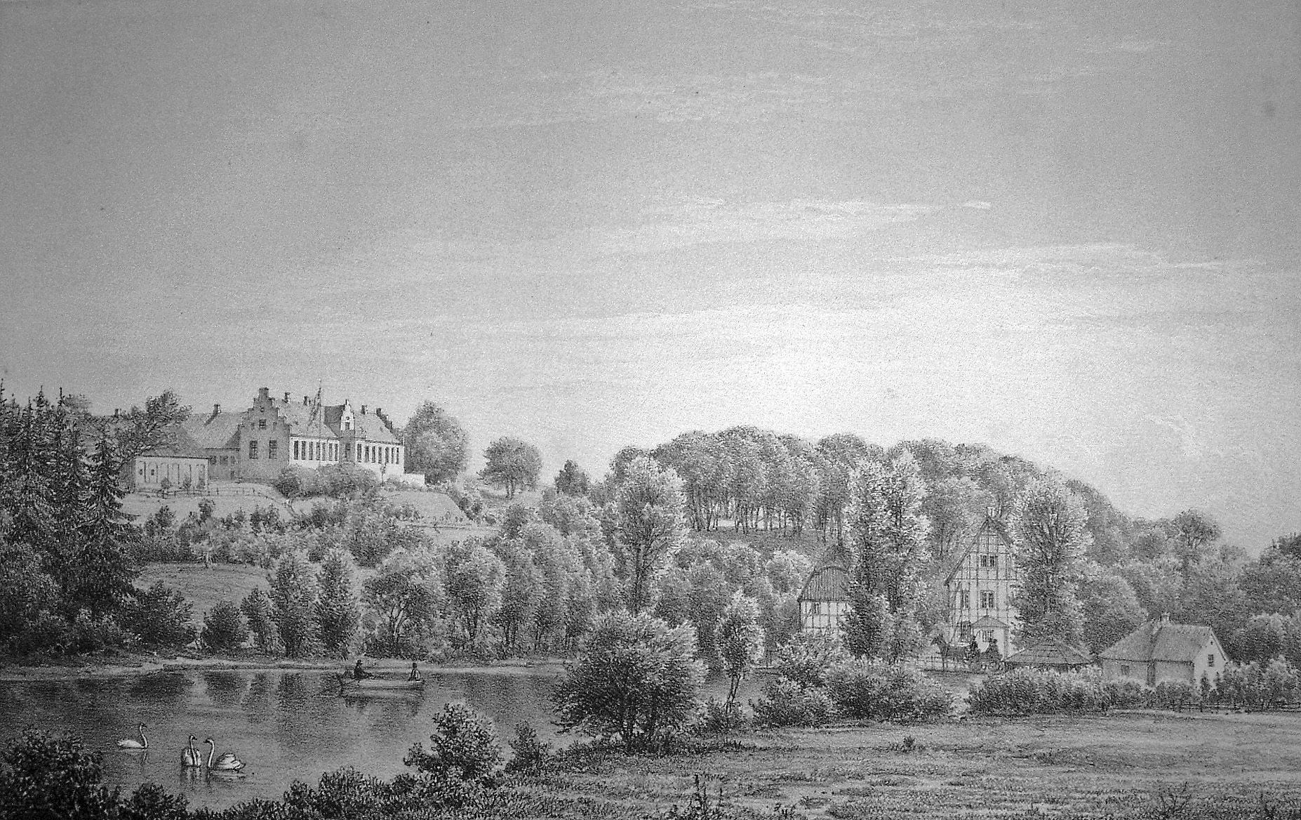 Mattrup er en gammel sædegård. Gården ligger 4 km øst for Klovborg station, og 1 km nord for landevejen Horsens - Nørre Snede i Tyrsting Sogn i Horsens Kommune. Hovedbygningen er opført i 1500 og ombygget i 1578-1760.